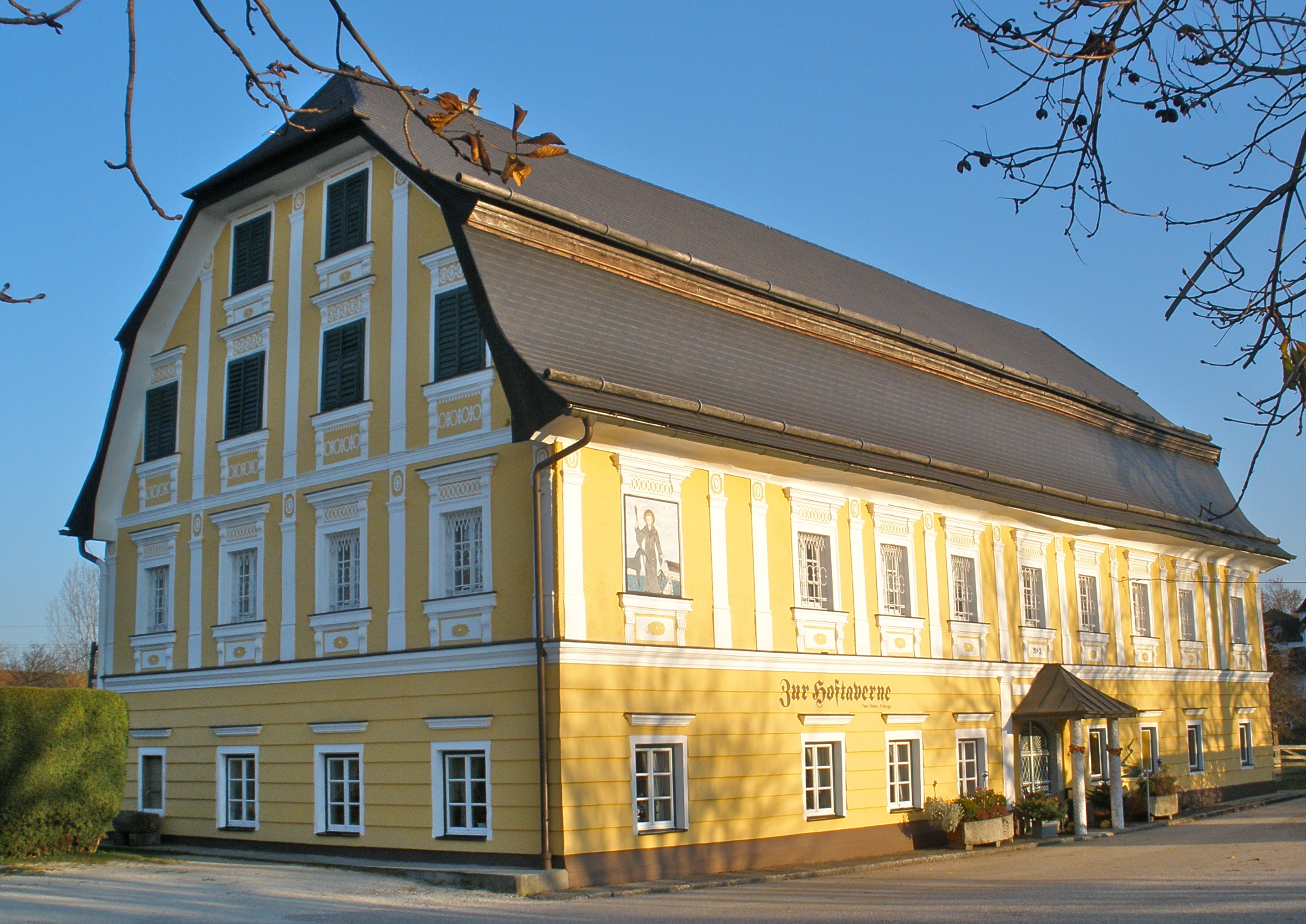 Gasthaus, Schlosstaverne